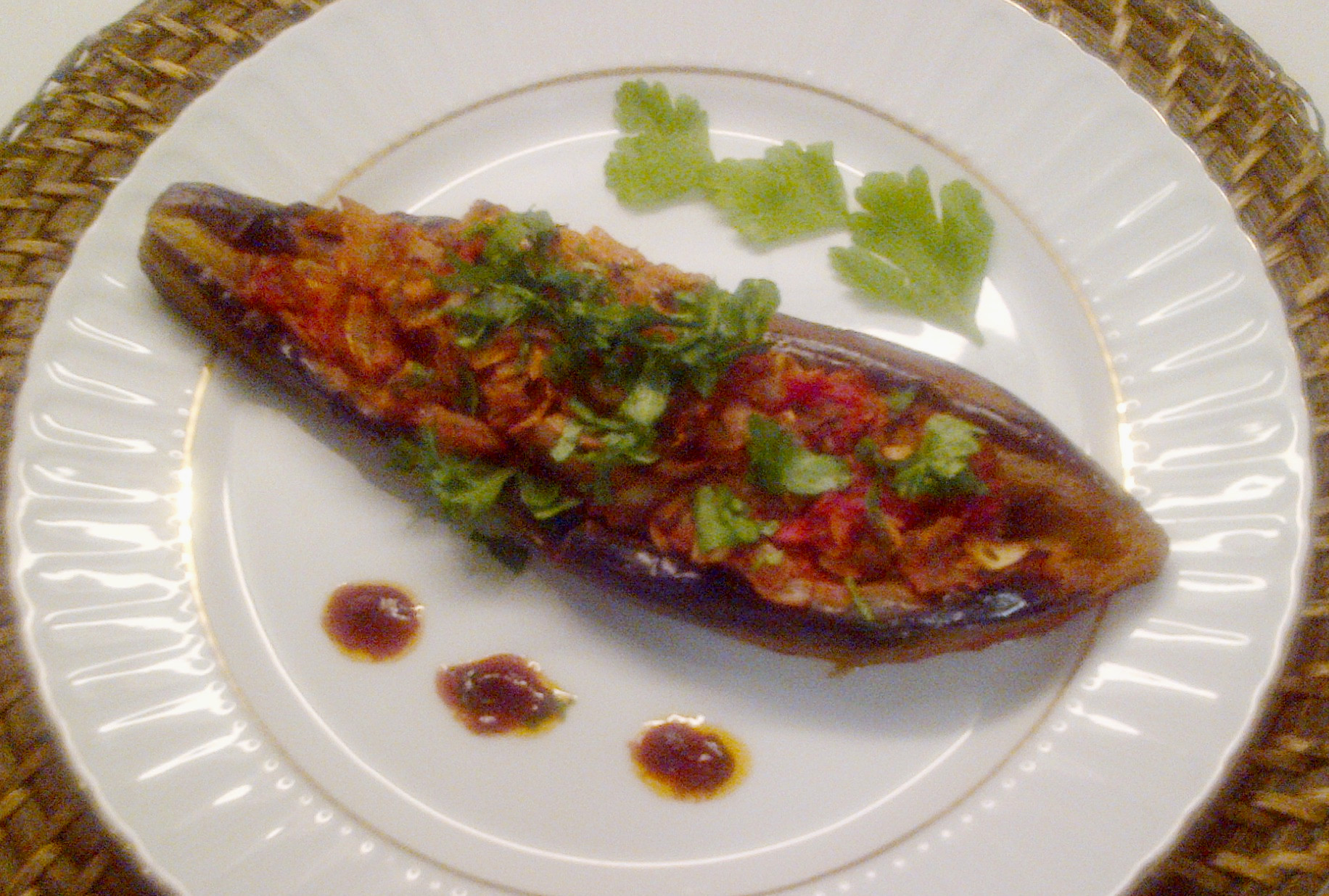 "İmambayıldı" es un plato frio, en la cocina turca, hecho con berenjenas, cebolla y aceite de oliva. Las palabras "imam bayıldı" literalmente significan que el imam ha desmayado, pero en realidad significa que el plato le gusto mucho. (Igual que "me muero por esta chica" en castellano.)